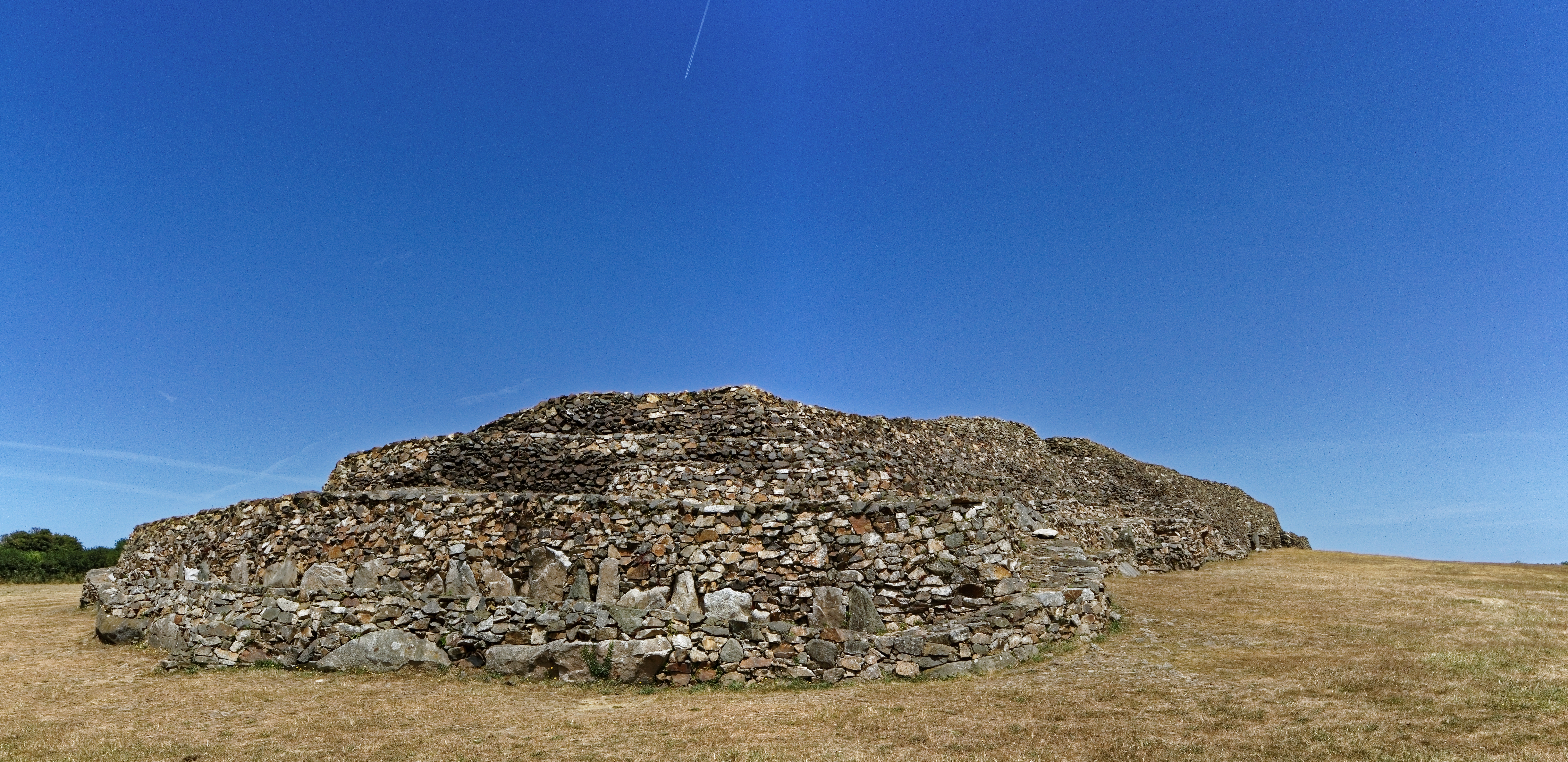 Panorama du Cairn de Barnenez à Plouezoc'h dans le Finistère. .